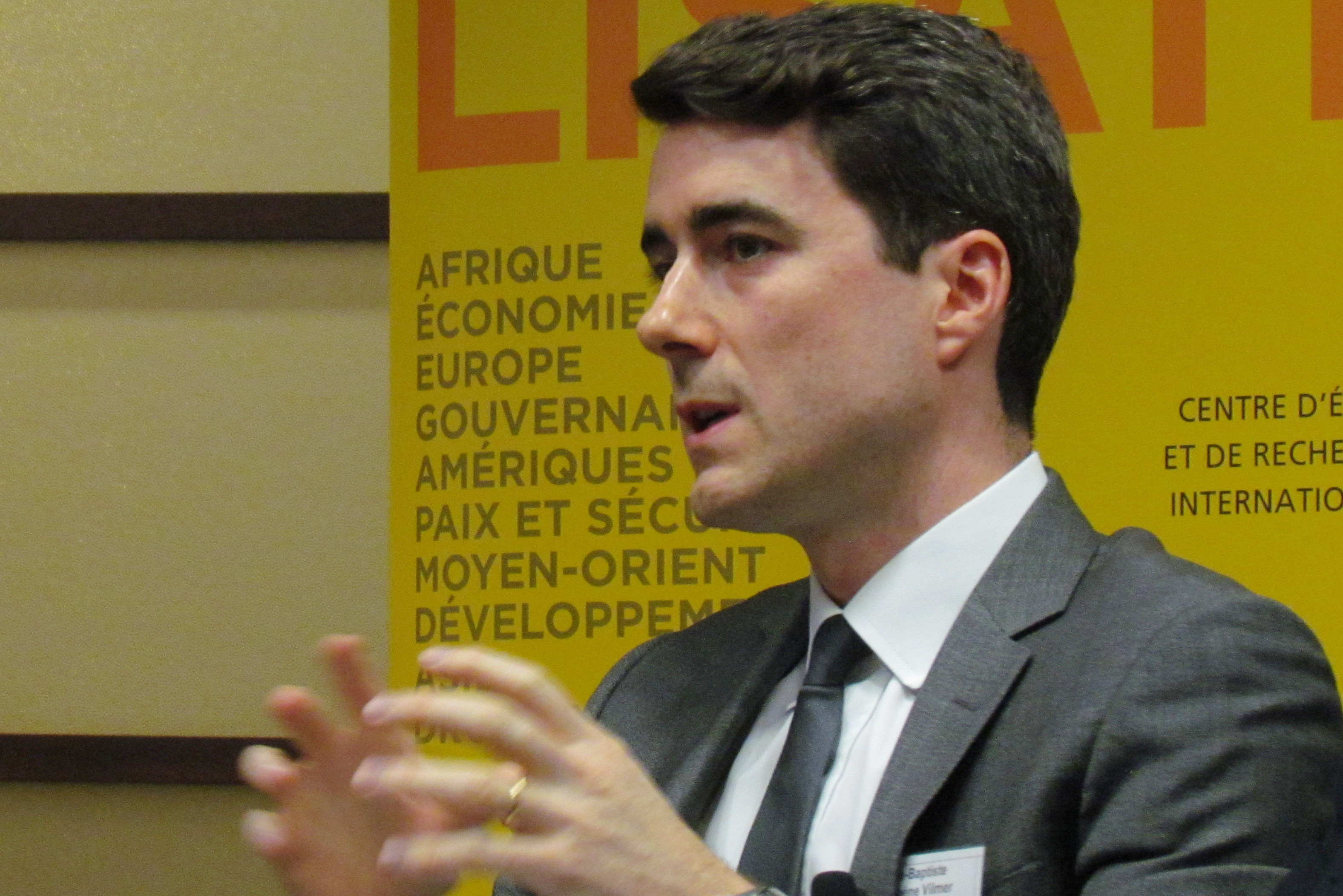 Le philosophe français Jean-Baptiste Jeangène Vilmer en mai 2015